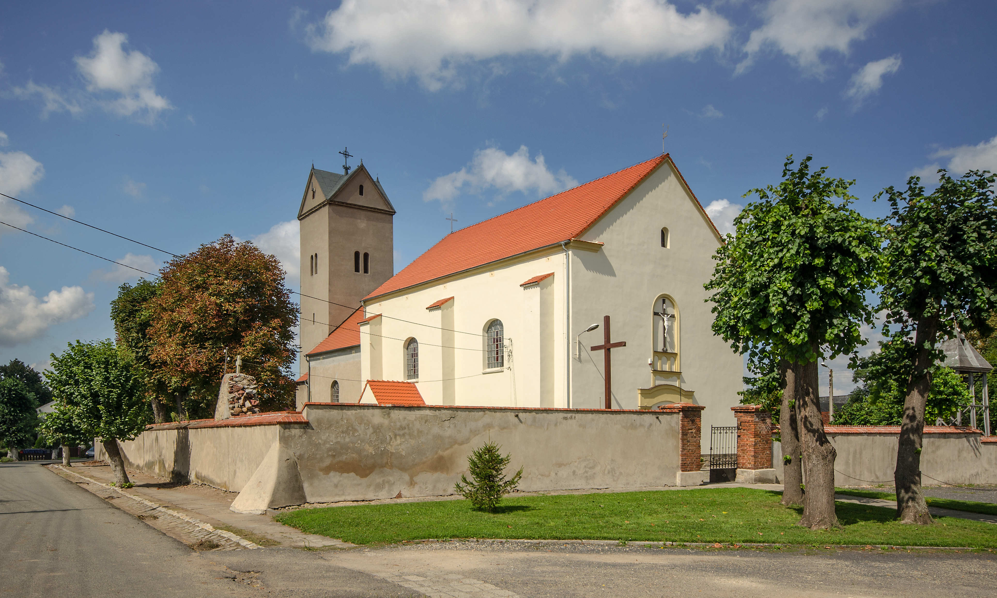 Jutrzyna, kościół par. p.w. św. Franciszka, XIII, XVI, XIX